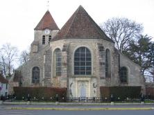 Mortcerf_Eglise